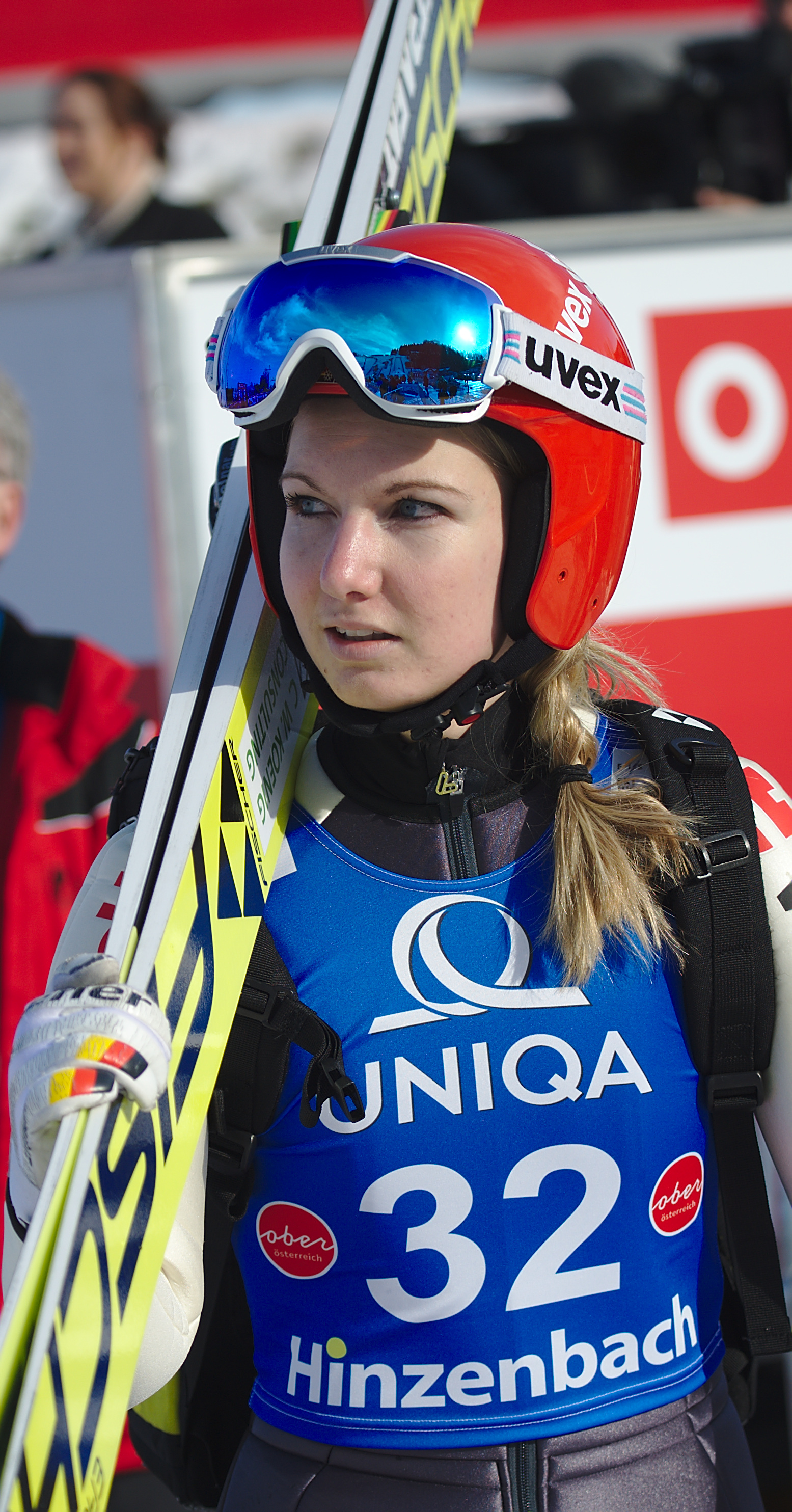 FIS Ski Jumping World Cup Ladies Hinzenbach 2017. Bild zeigt Svenja Würth (GER)